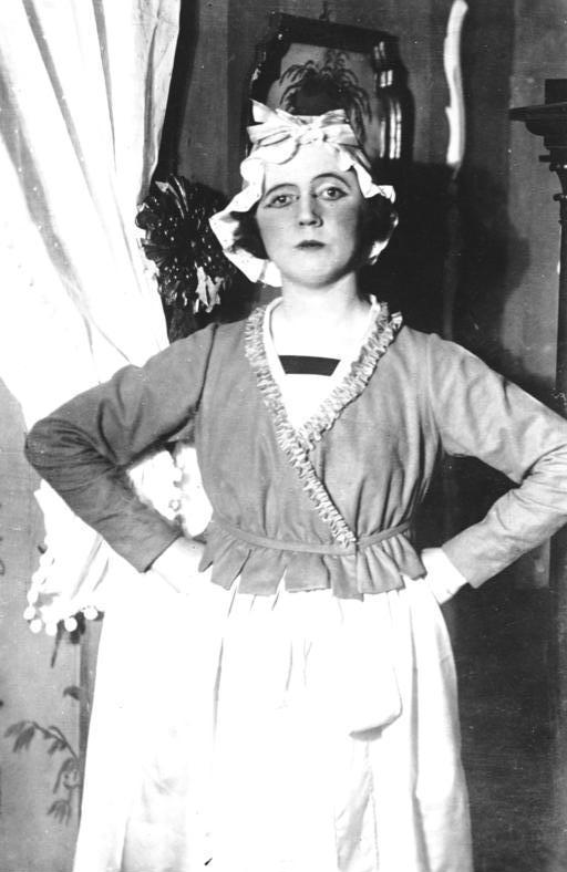 Claire Waldoff in "Drei alte Schachteln" Waldoff, Claire [Kläre] in "Drei alte Schachteln" Zentralbild 13183-17 Abgebildete Personen: Waldoff, Claire: Kabarettistin, Schauspielerin, Sängerin, Deutschland